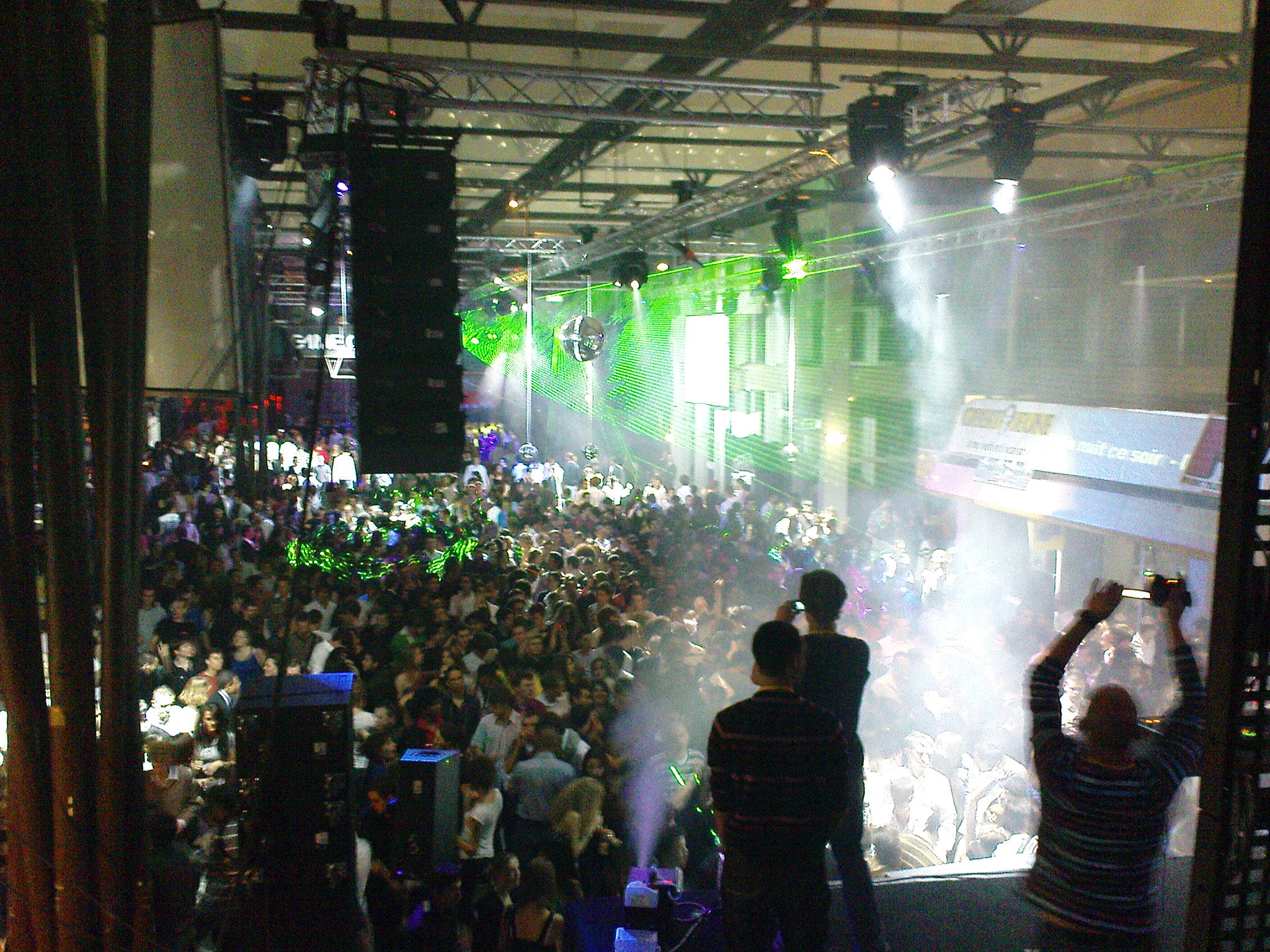 Dancefloor du Point Gamma 2008